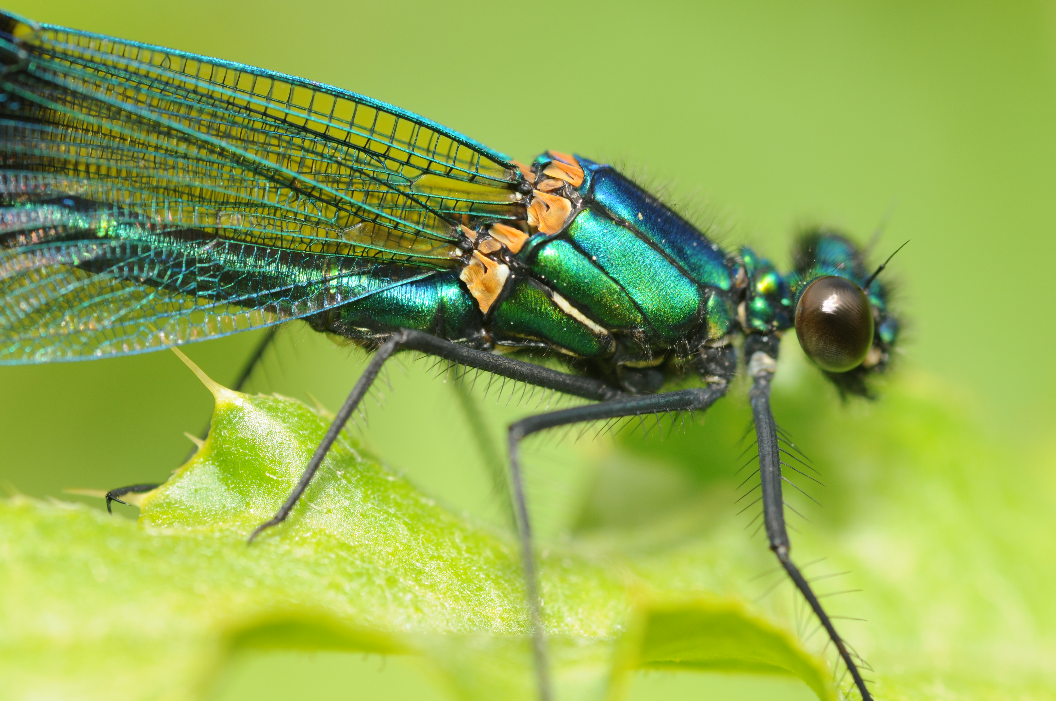 Calopteryx éclatant.